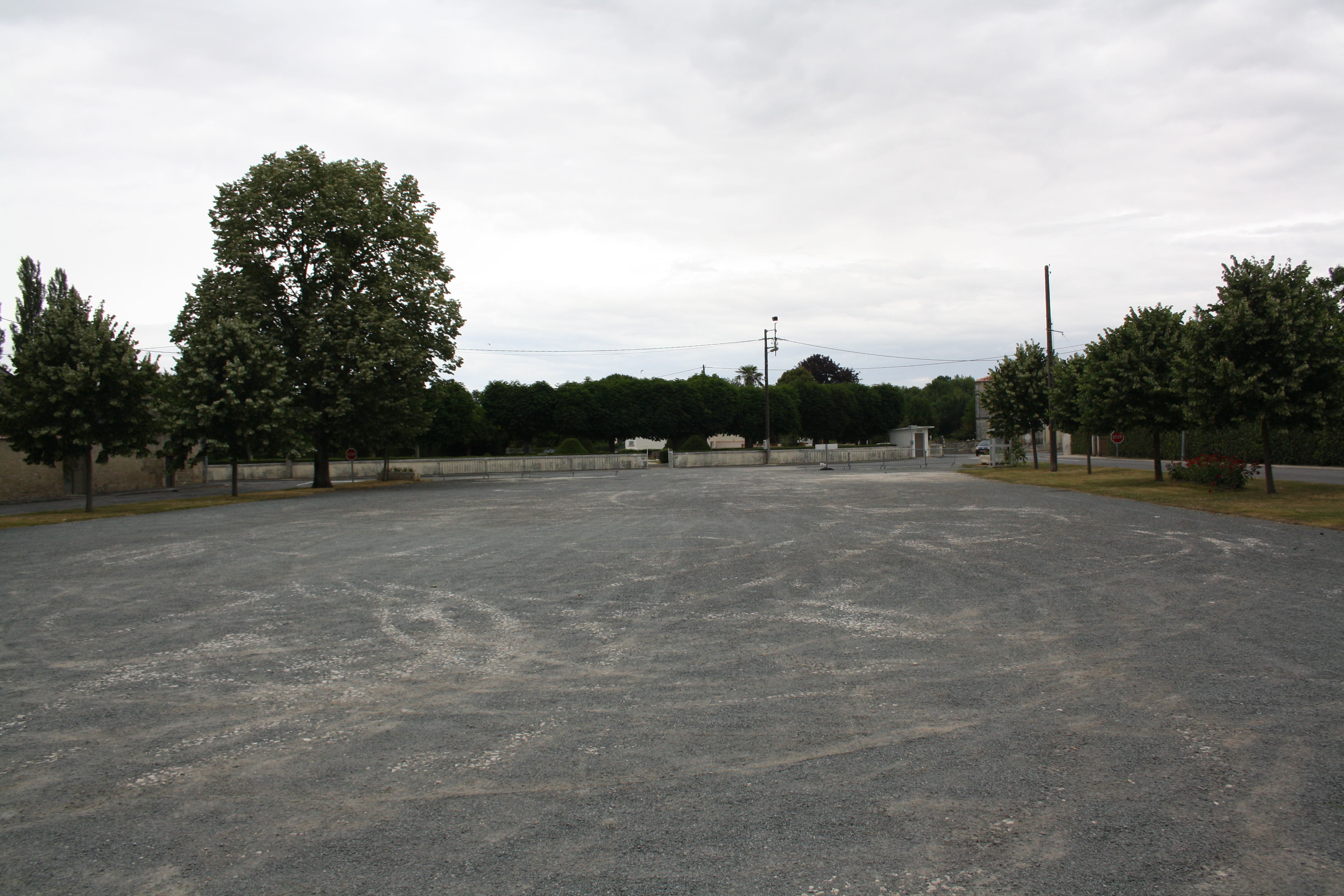 Place d'Authon (Charente-Maritime, France).